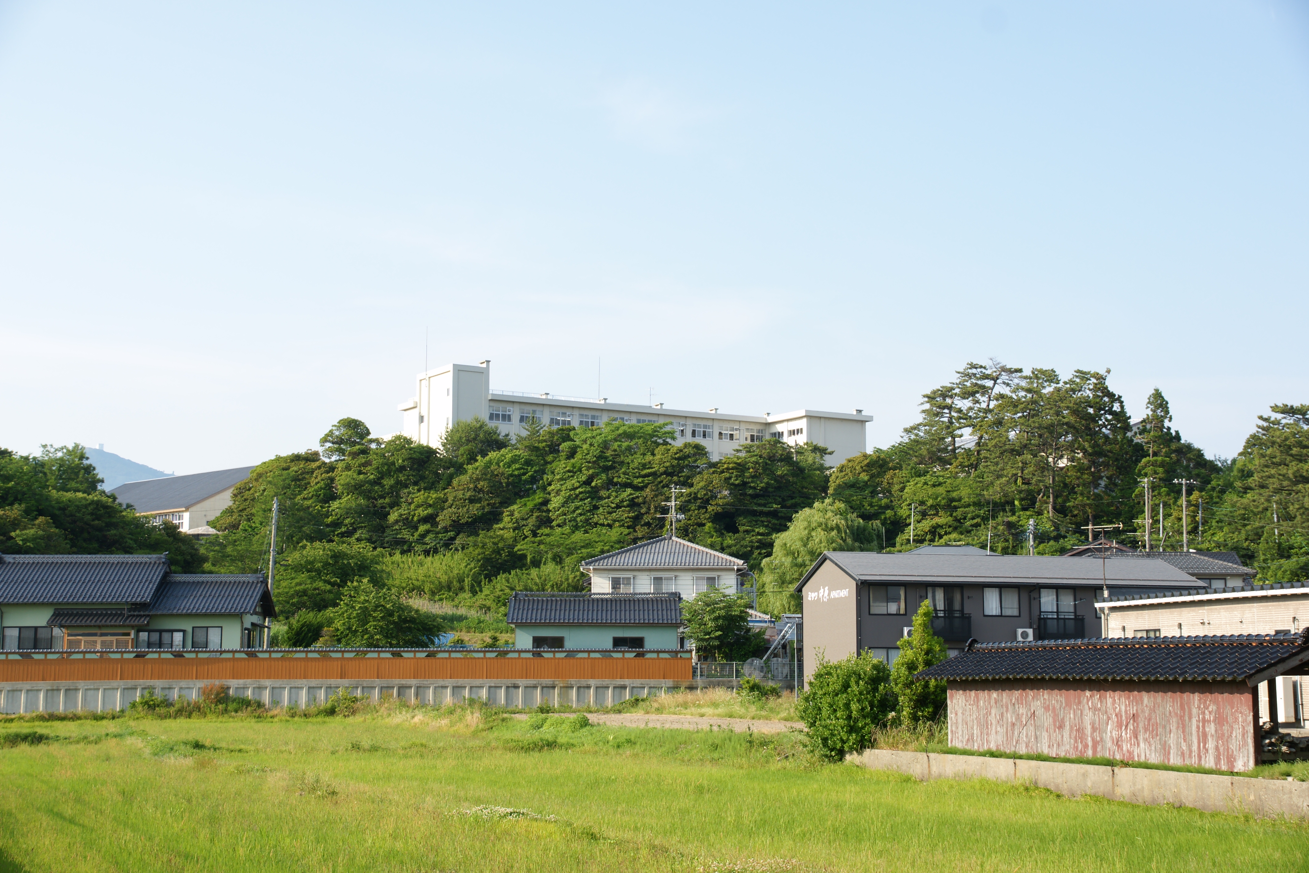 坂の下から撮影した佐渡高校の校舎外観です。